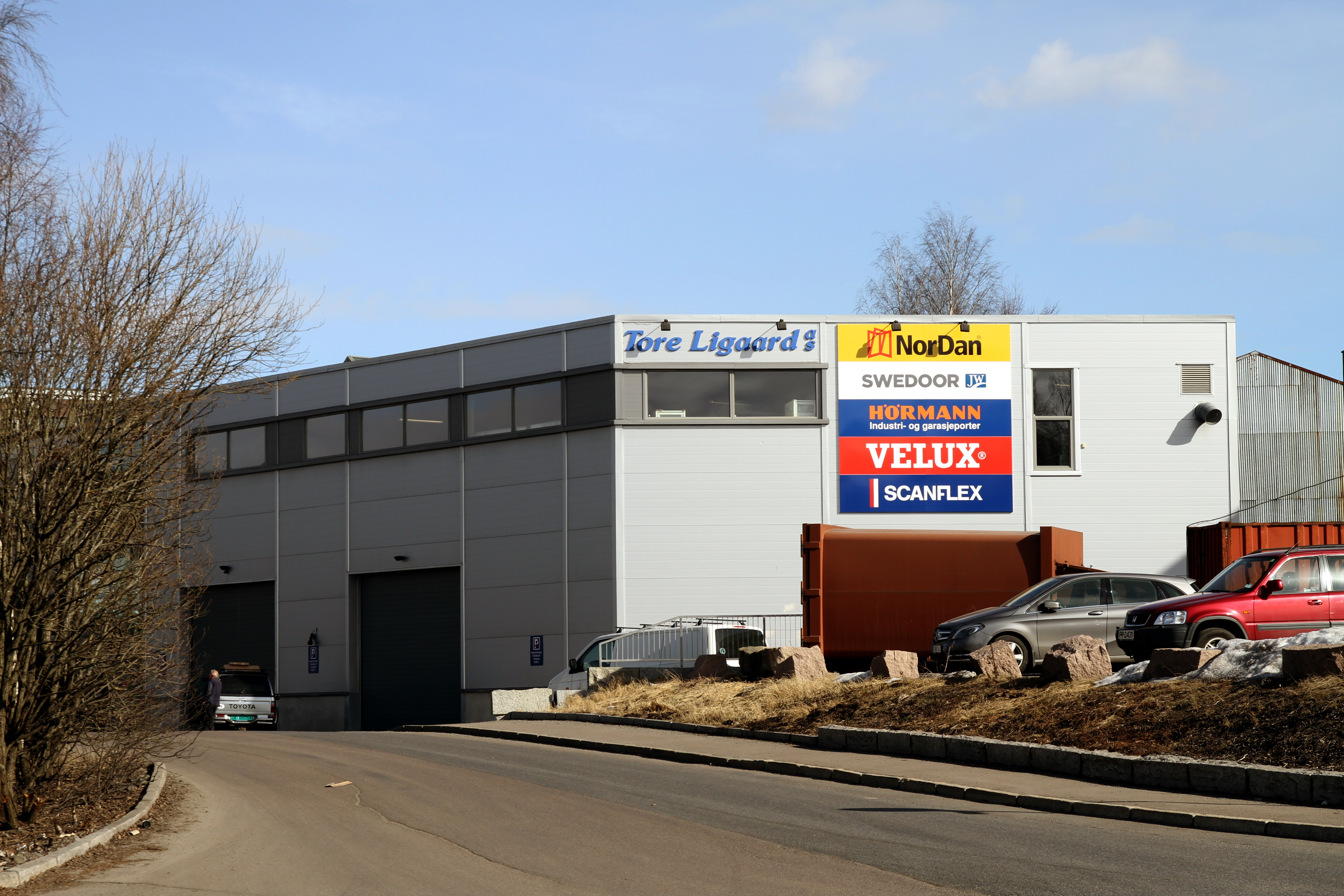 Alfasetveien 1 på Alnabru i Oslo.